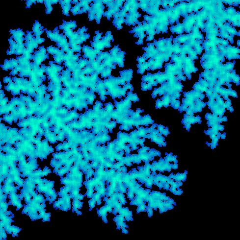 Simulation eines Diffusionsbegrenzten Wachstums (DLA)